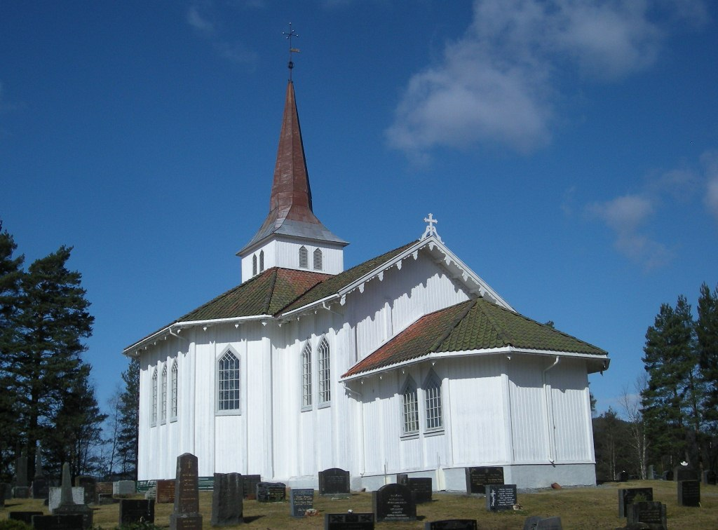 Hval kirke i Hallingby, Ytre Ådal